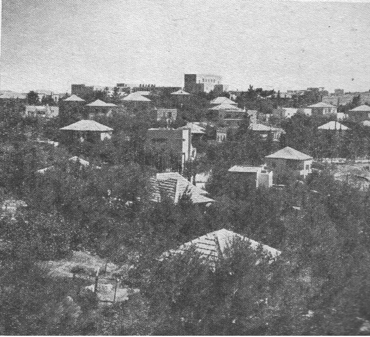 מראה כללי של שכונת בית הכרם בשנת 1943. הבניין הבולט על קו האופק הוא הסמינר למורים על שם דוד ילין.